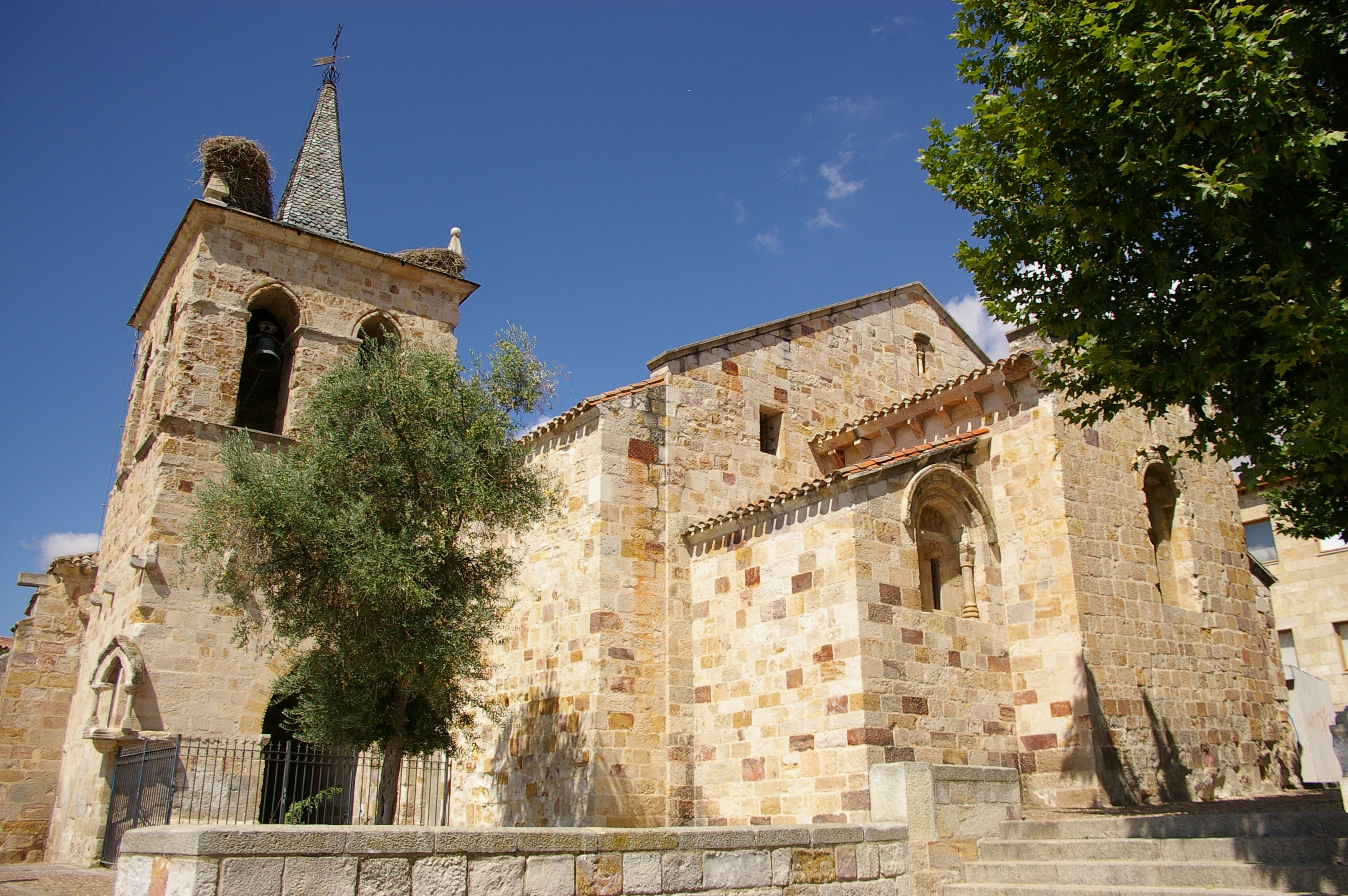 Iglesia de San Cipriano, en Zamora. Iglesia románica del siglo XII.